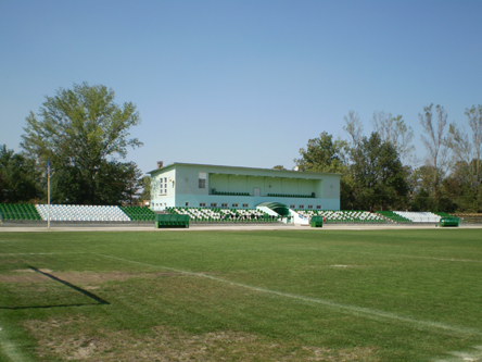 Стадион "Чавдар" - Бяла Слатина